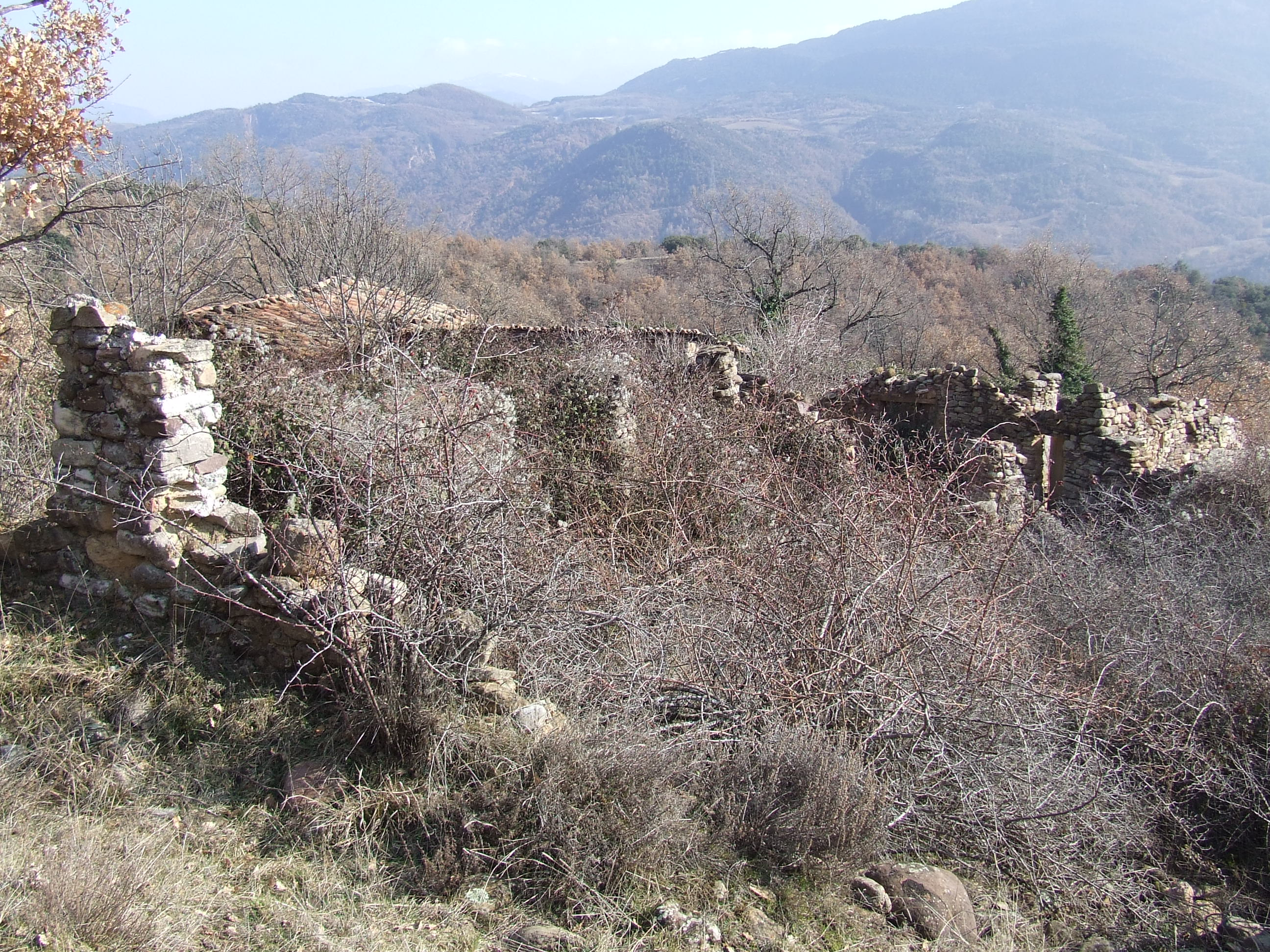 Una altra panoràmica de les Bordes d'Estavill (la Pobleta de Bellveí, la Torre de Cabdella, Pallars Jussà)